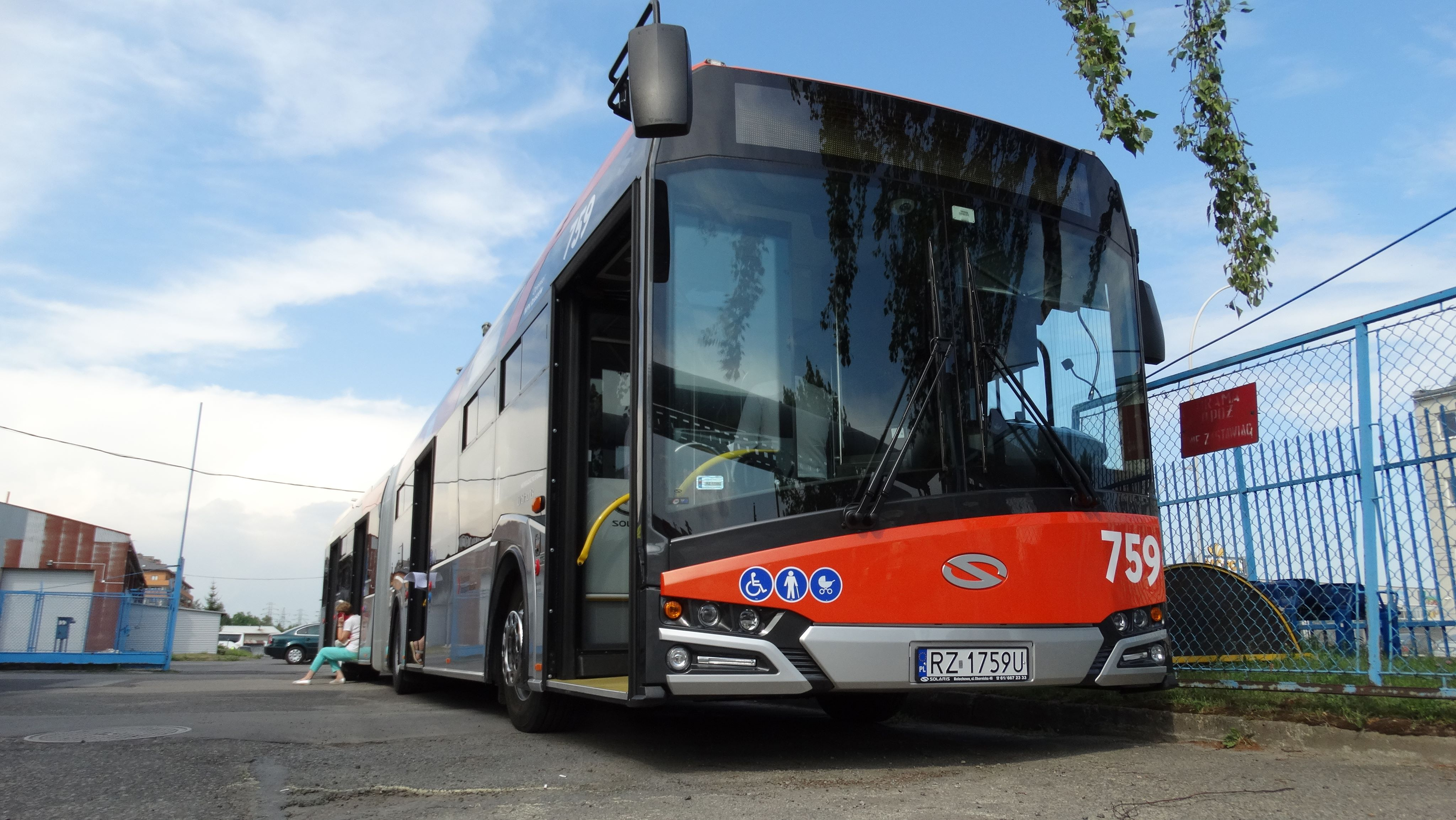 Solaris Urbino 18 IV prezentowany podczas "Dni Otwartych Funduszy Europejskich"